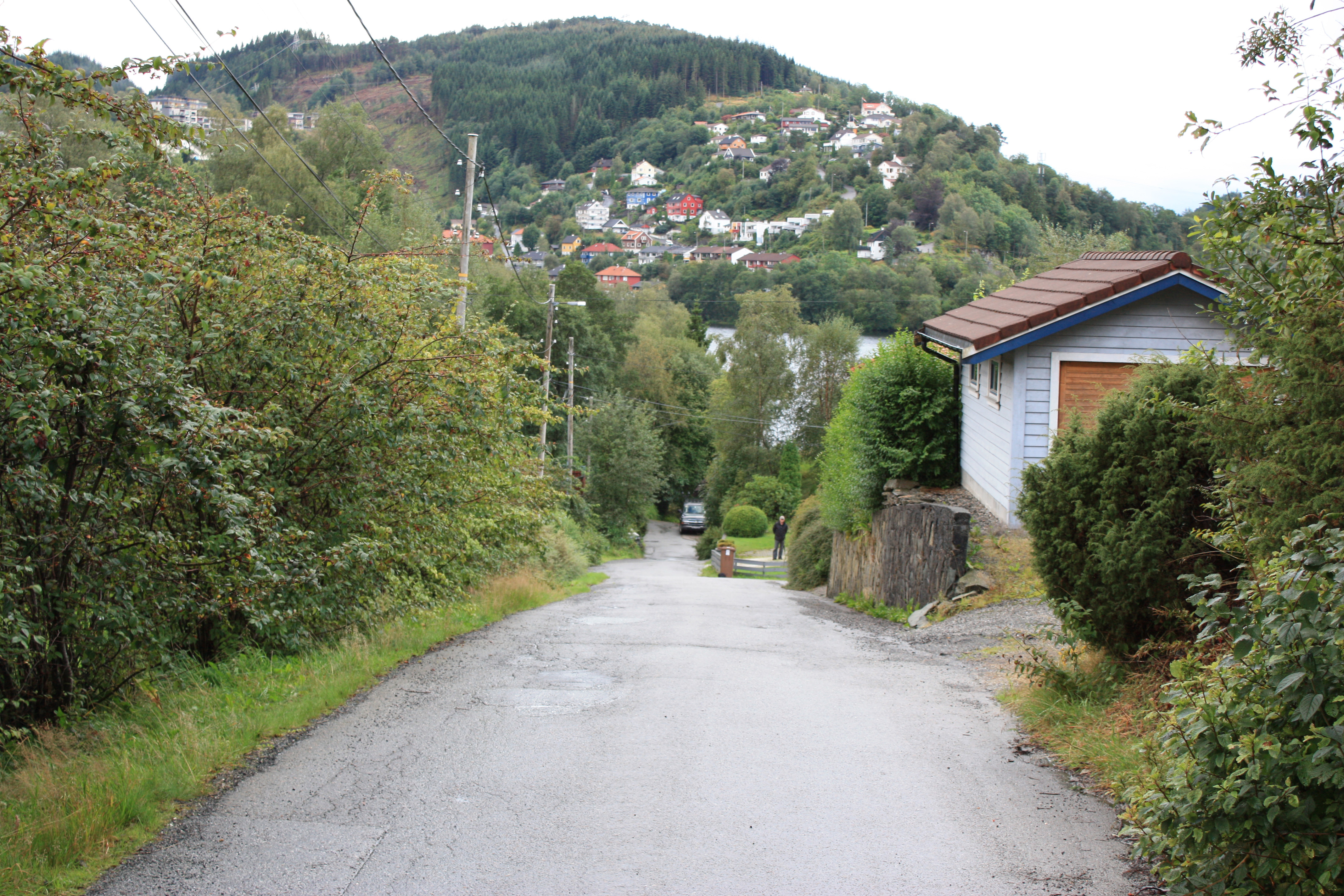 Bevervegen, Fana, Bergen.